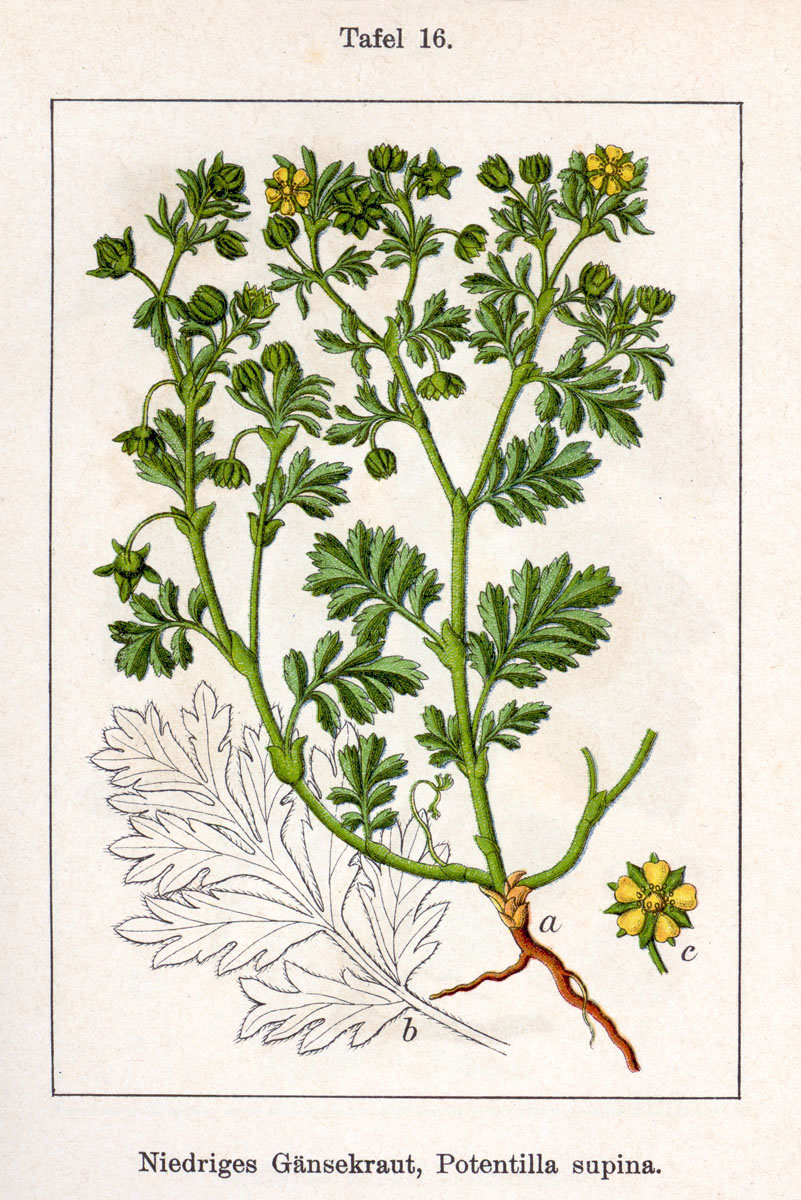 Potentilla supina L. Original Description Niedriges Gänsekraut, Potentilla supina